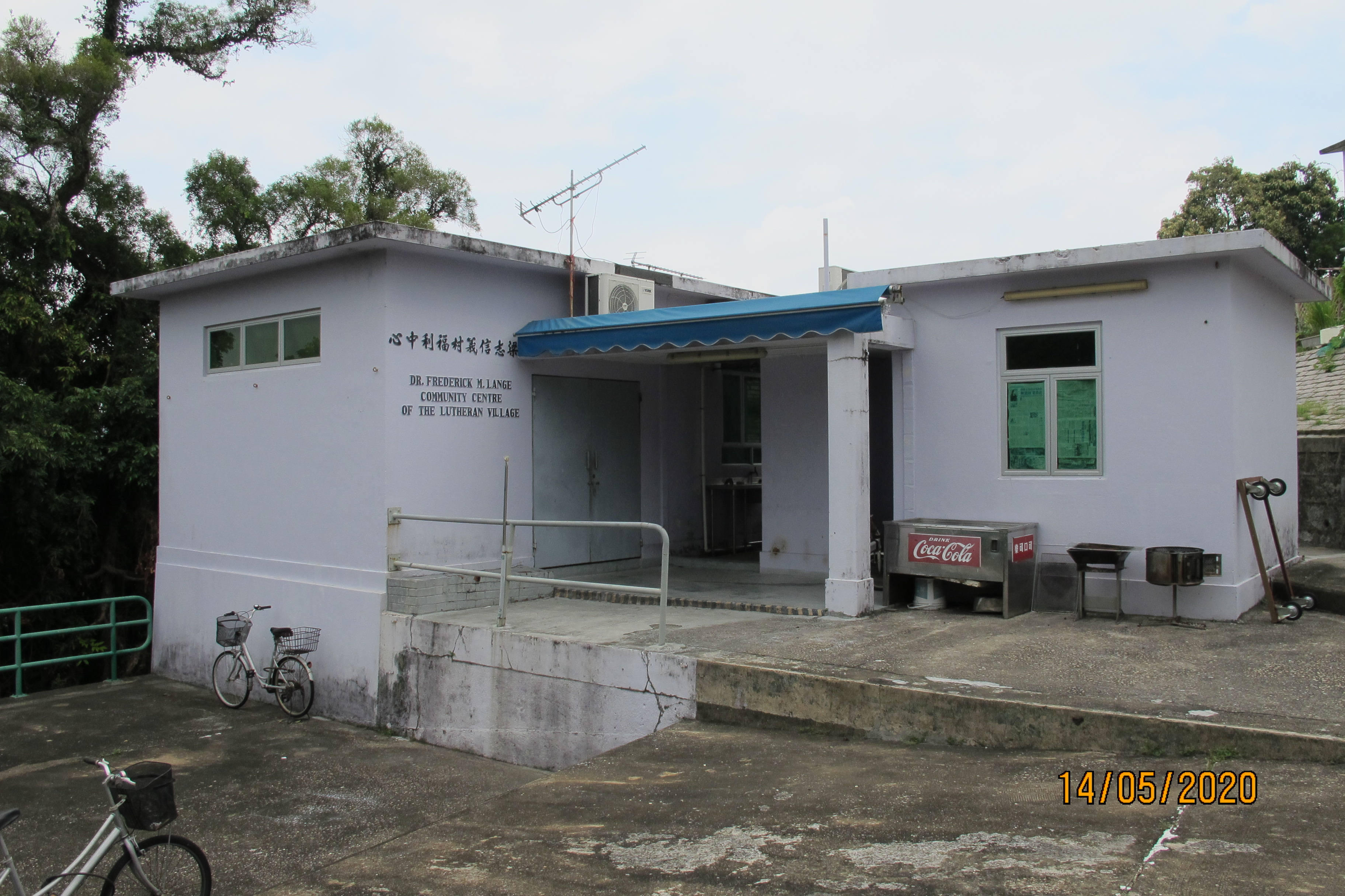 中文（香港）: 信義村_梁志福利中心